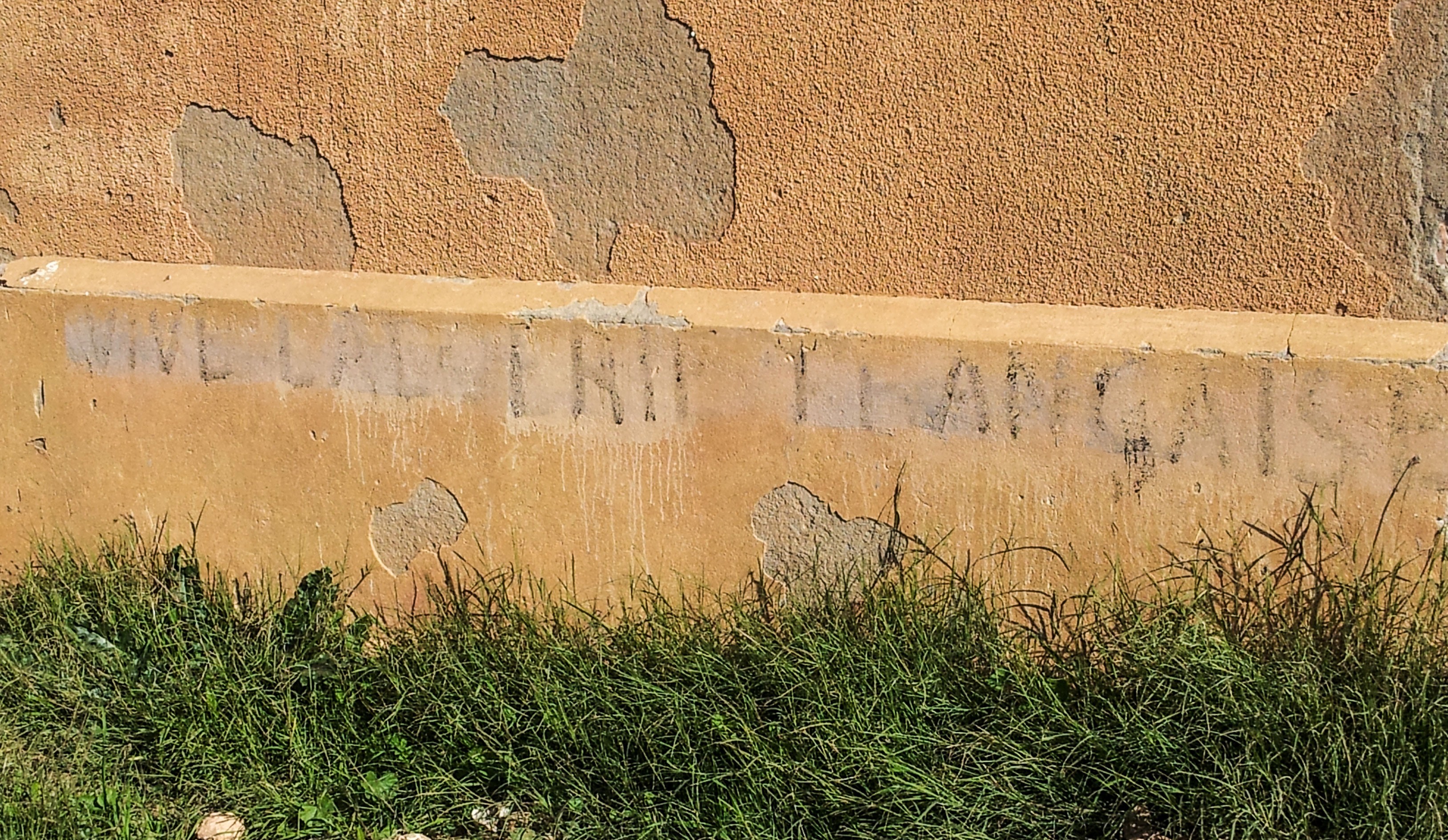 14 décembre 2012 à Djdiouia, ex Saint Aimé (Algérie) : cinquante ans après l’indépendance de l'Algérie, des graffitis muraux sont encore visibles du fameux slogan pied noir : « Vive l'Algérie française ». Ces inscriptions datent des dernières années de présence française en Algérie.